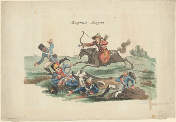 Северный Амур.